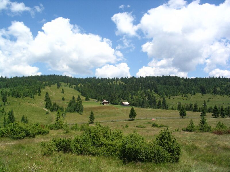 Magas-bükk, az Olt forrása, Gyergyói-havasok, Erdély